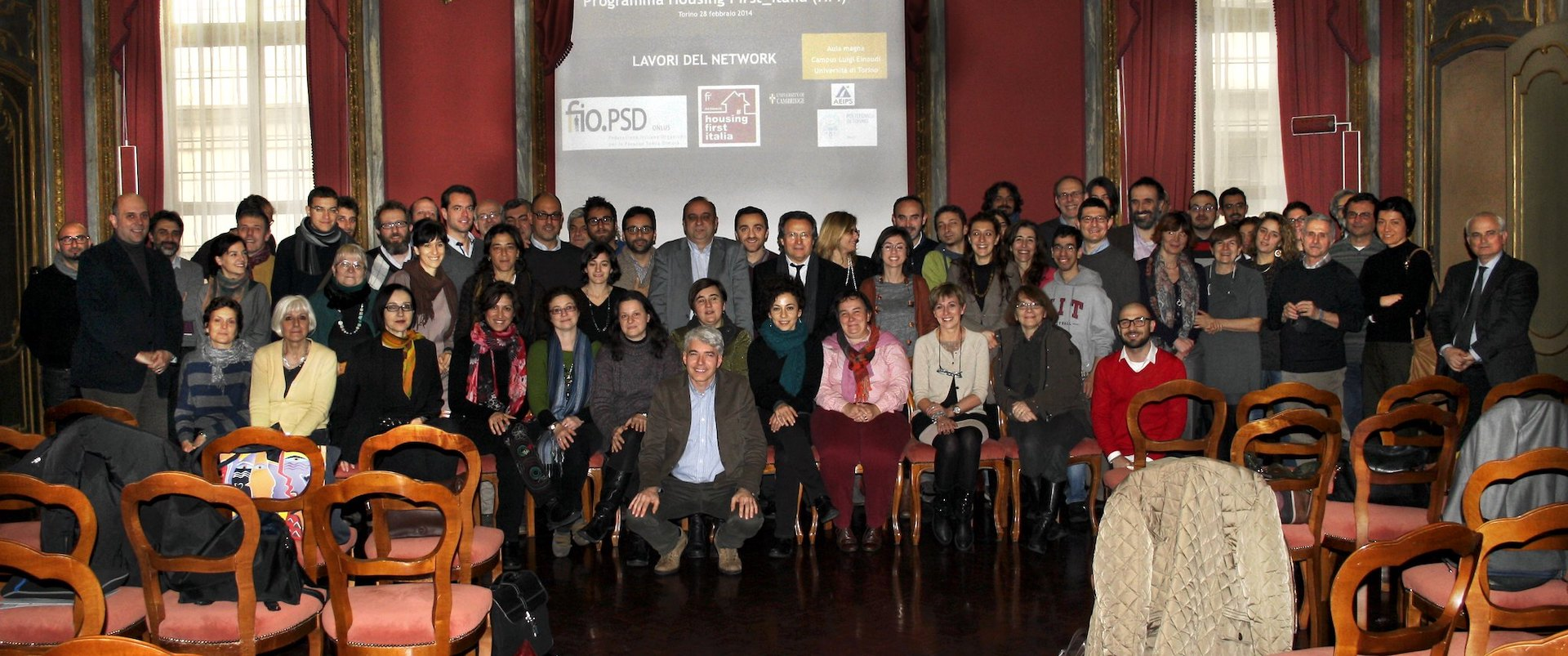 Primo incontro di fondazione del Network Housing First Italia